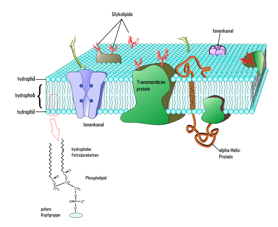 Zellmembran eigene Zeichnung